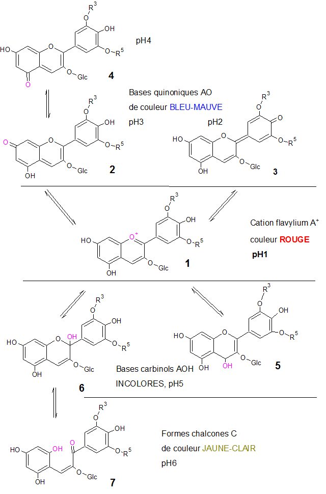 Equilibre des anthocyanosides en solution aqueuse